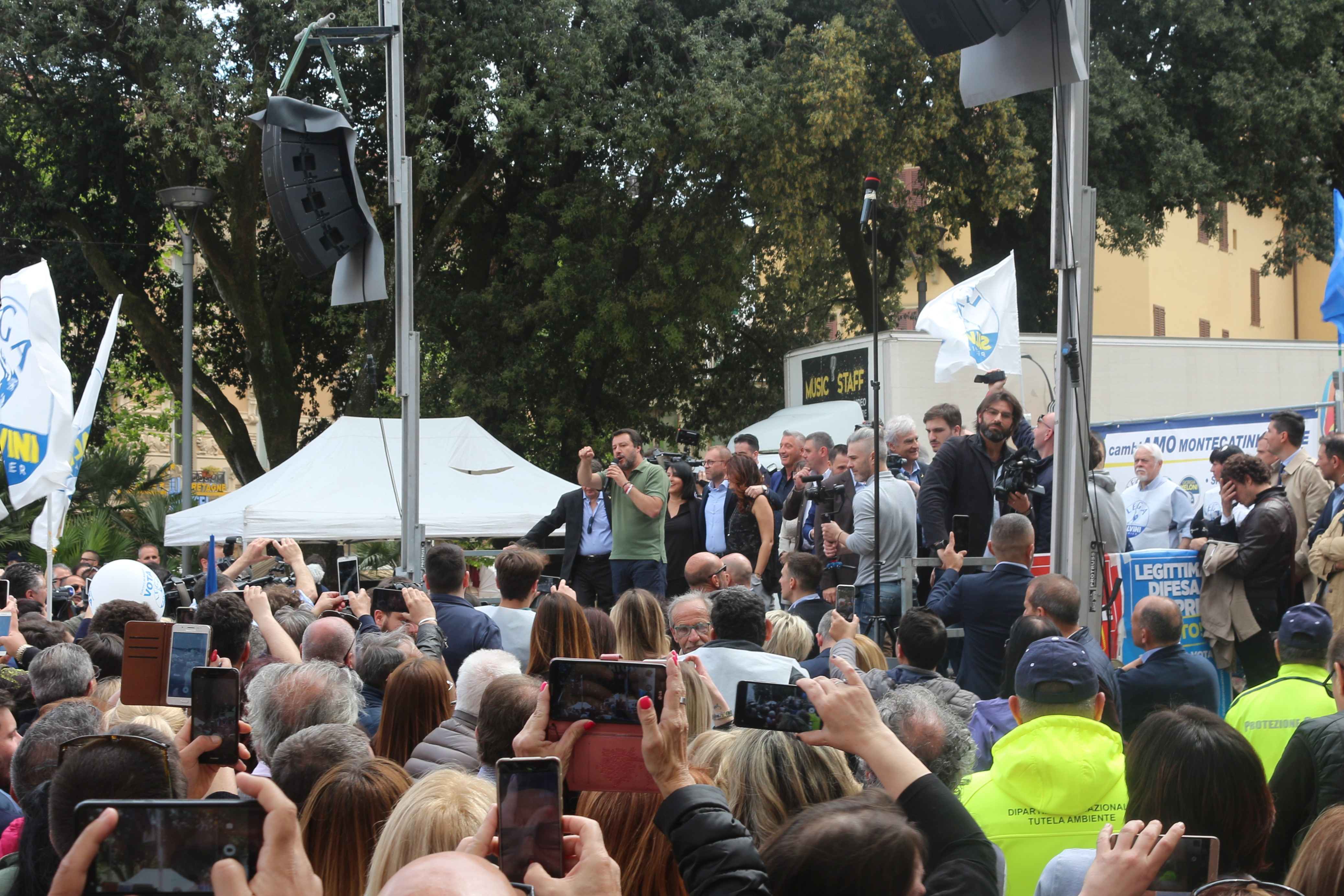 Comitato elettorale della Lega davanti alla Basilica di Montecatini Terme per le elezioni comunale ed europee di maggio 2019, con Matteo Salvini, Susanna Ceccardi (candidata nella circoscrizione Italia Centrale) e il candidato sindaco locale Luca Baroncini